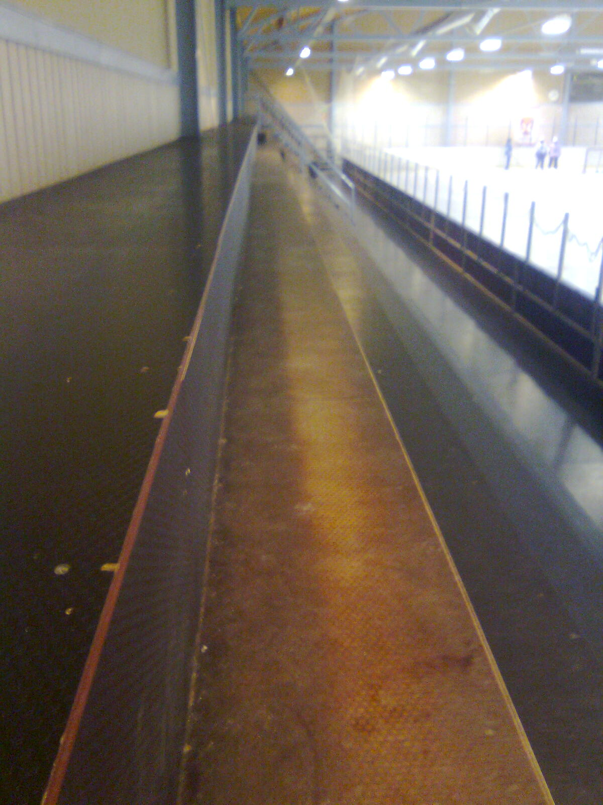 Tikkakosken jäähalli sisältä.